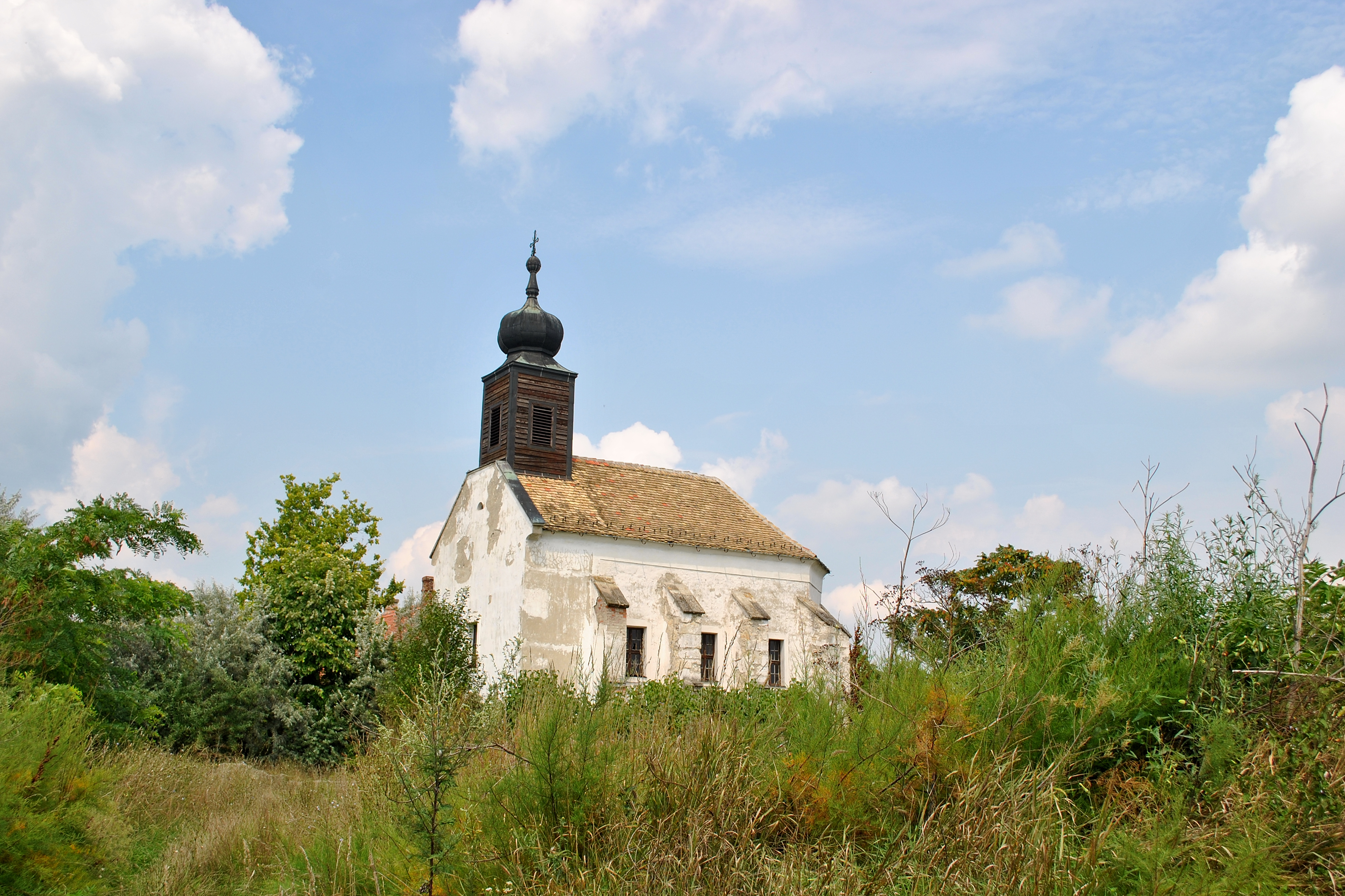 Nazarénus ház (Etyek, Botpuszta); Szeplőtelen Fogantatás római katolikus templom This is a photo of a monument in Hungary. Identifier: 3632